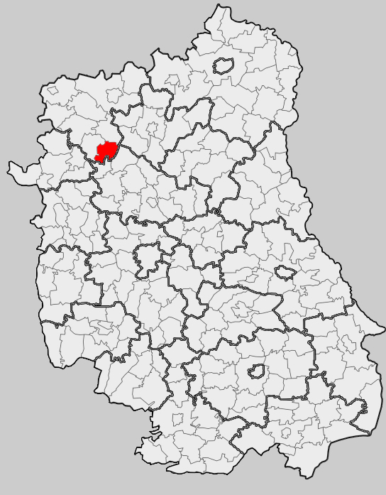 Map of gmina Serokomla, Łuków county, Lublin voivodship Mapa gminy Serokomla, powiat łukowski, województwo lubelskie